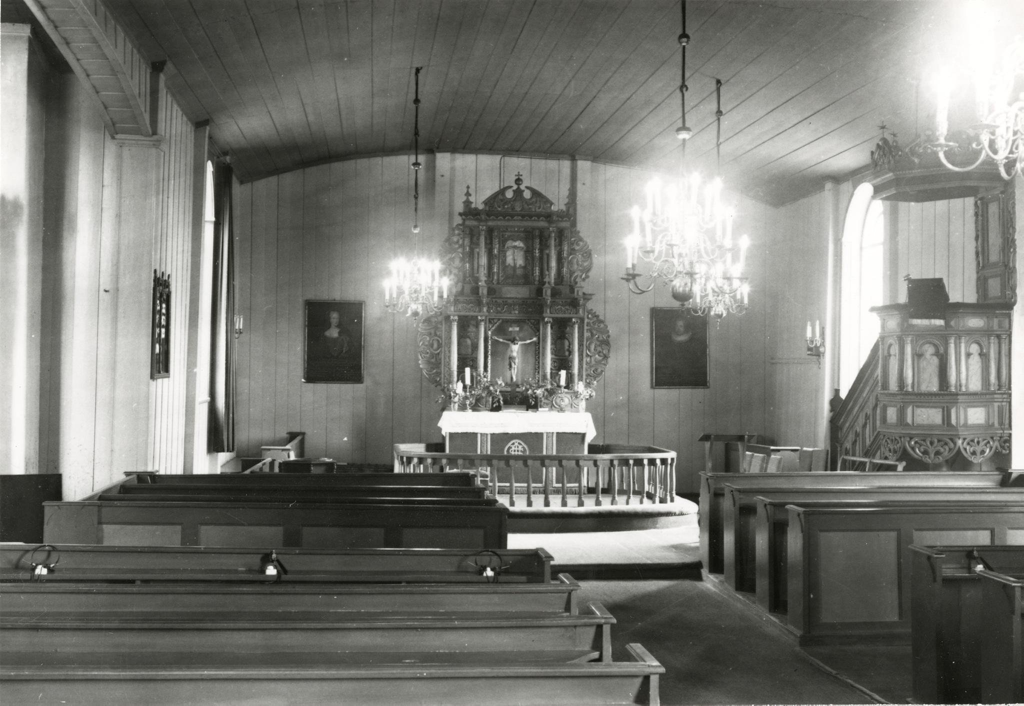 Interiør i Hovin kirke i Ullensaker. Fra Kulturminnebilder.no.